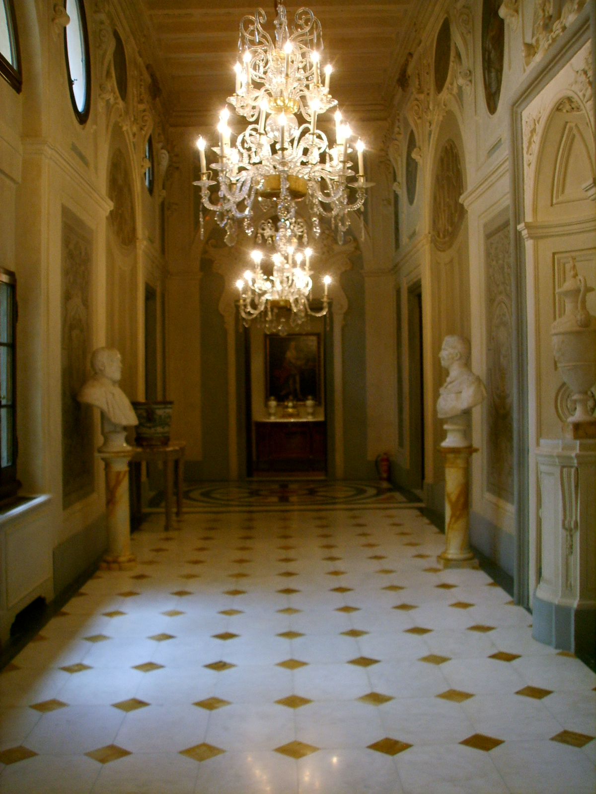 Palazzo della gherardesca, corridoio piano nobile